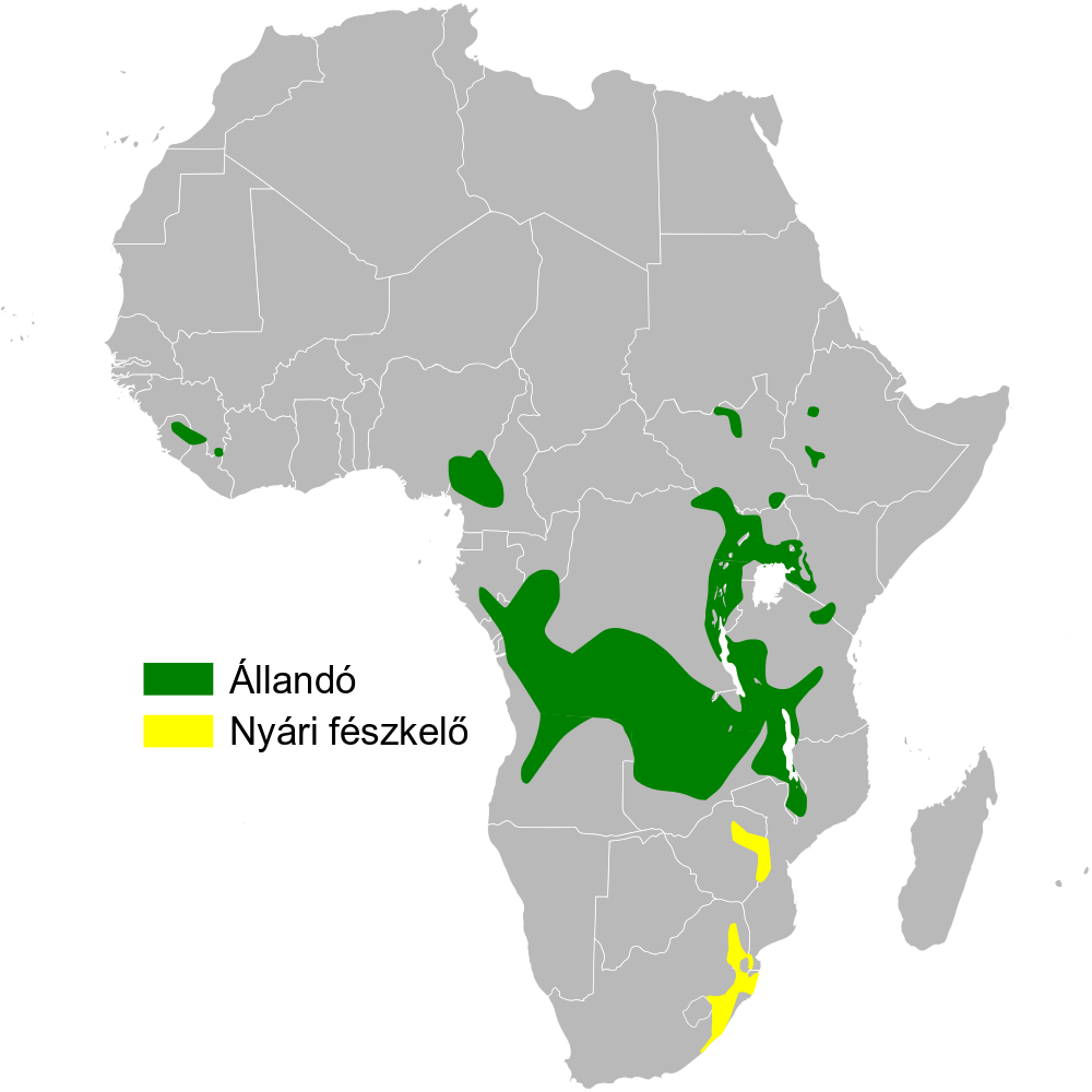 Schoenicola brevirostris distribution map, based on